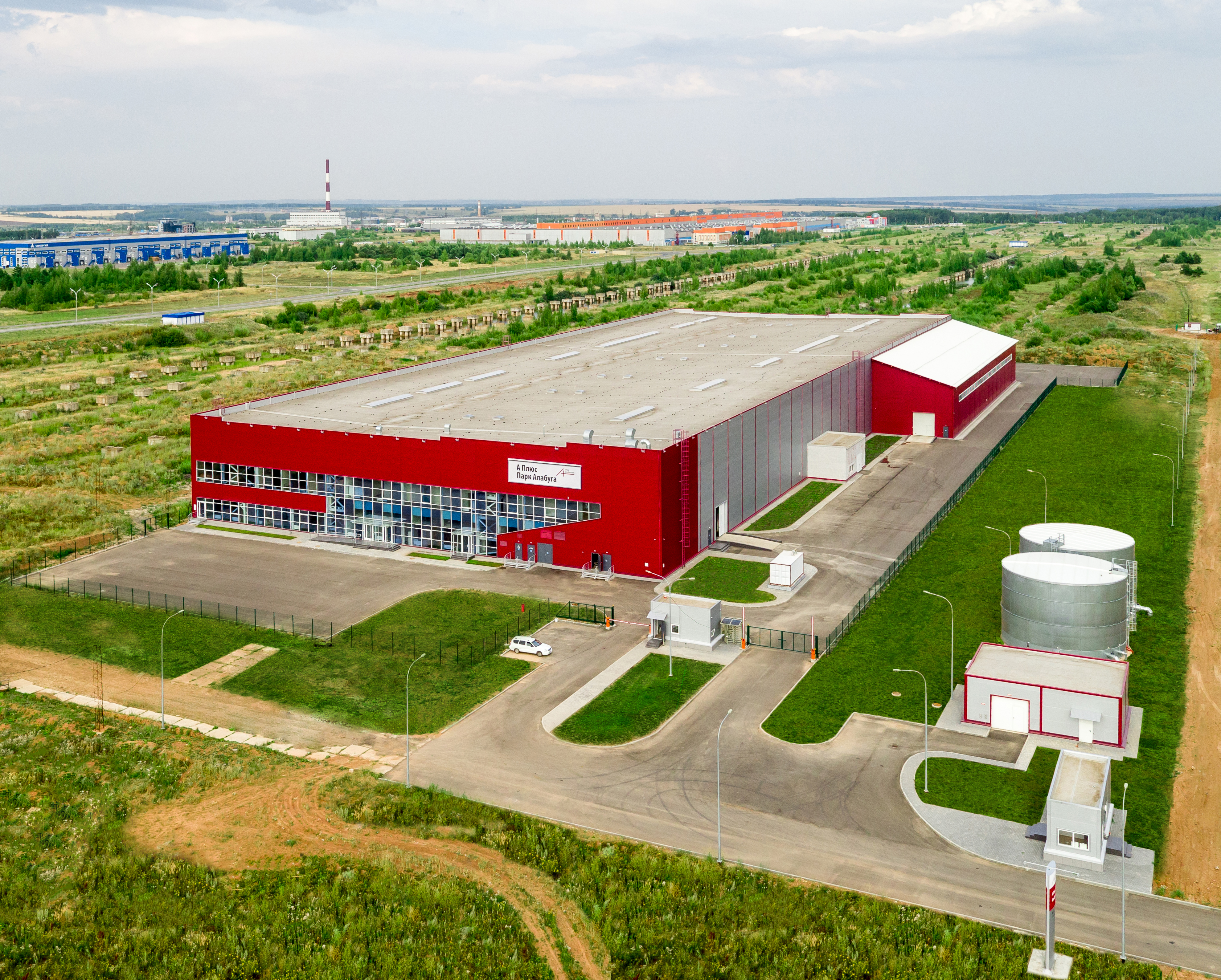 Особая экономическая зона «Алабуга», индустриальный парк «А Плюс Парк Алабуга»